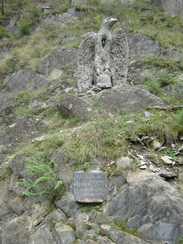 ორწყალი